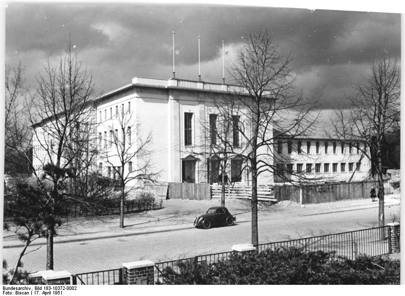 Illus-Biscan Gr-Qu 17.4.51 Eröffnung des neuen Kulturhauses in Magdeburg am 1. Mai. Am internationalen Feiertag der Werktätigen wird das neue grosse Kulturhaus eröffnet, das die fünf grossen SAG-Betriebe für ihre Belegschaften errichtet haben. Das Kulturhaus hat einen Festsaal für 1000 Besucher, einen zweiten Saal für 250 Besucher, Klub- und Leseräume und ein kleines Restaurant. Später wird noch eine Sporthalle angebaut.